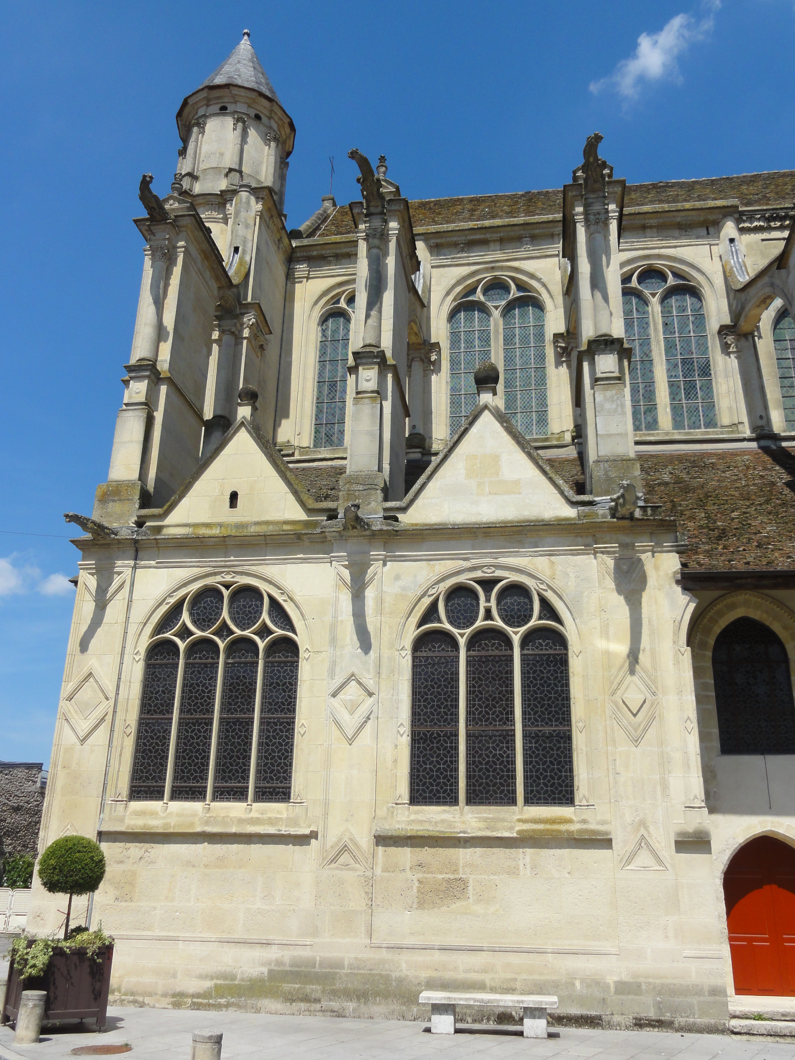 Élévation méridionale, 1ère-2e travée.